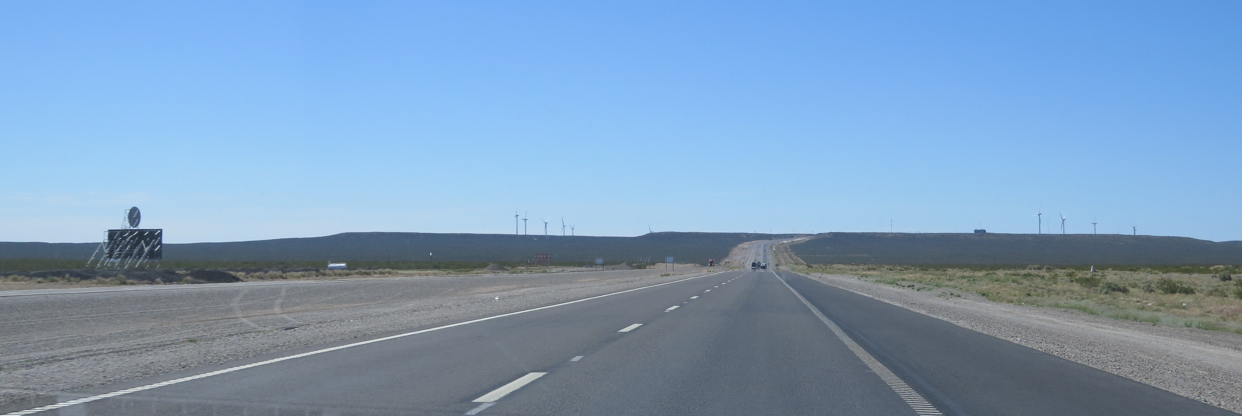 vista de la ruta 3 entre Trelew y Puerto Madryn